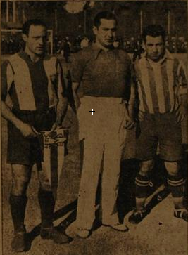 Capitanes de Unión (Loyarte izquierda) y el combinado de España (Martu derecha) junto al arbitro Alvarez (centro)